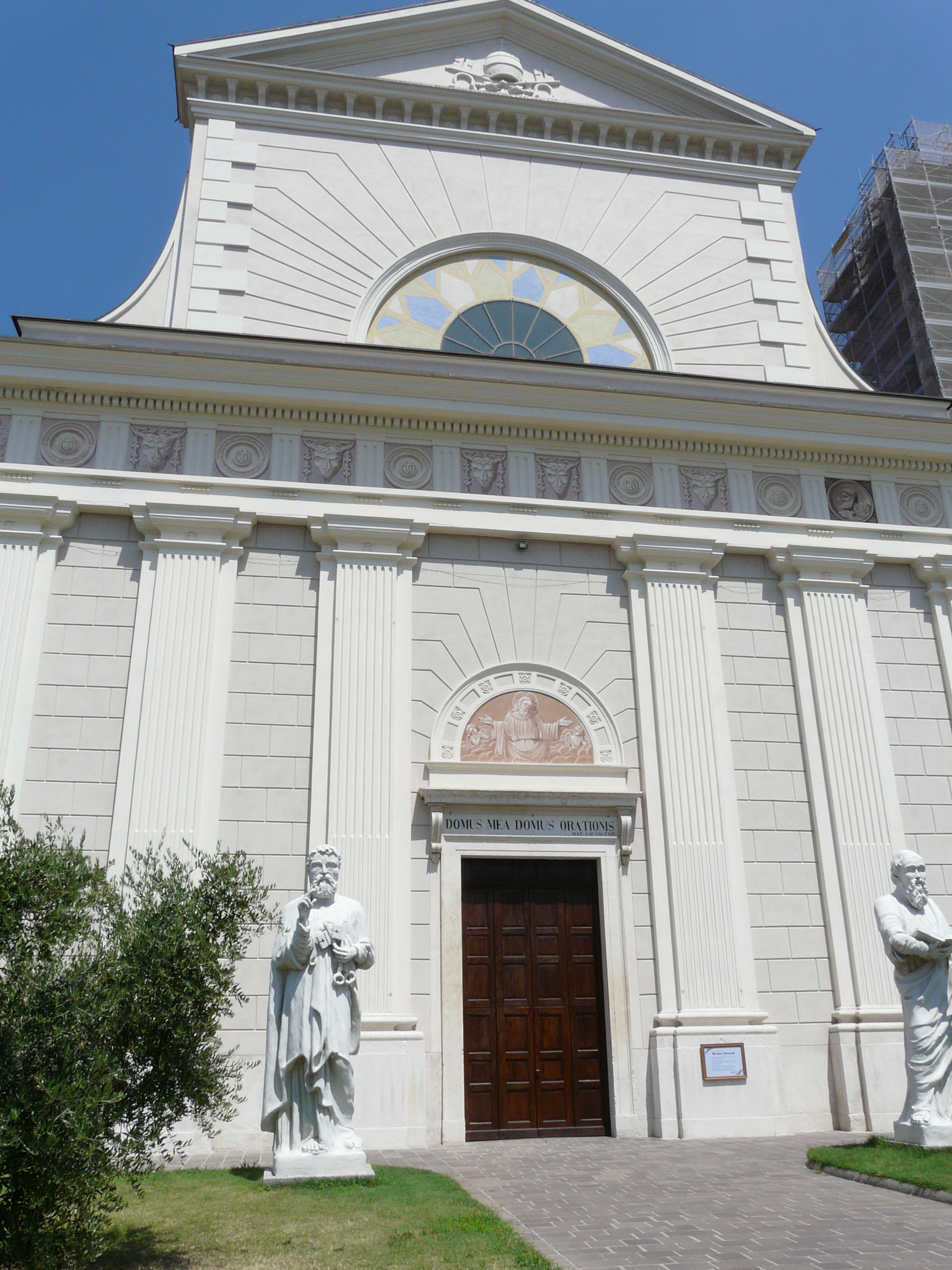 Chiesa di San Pietro Apostolo, Viadana, Lombardia, Italia